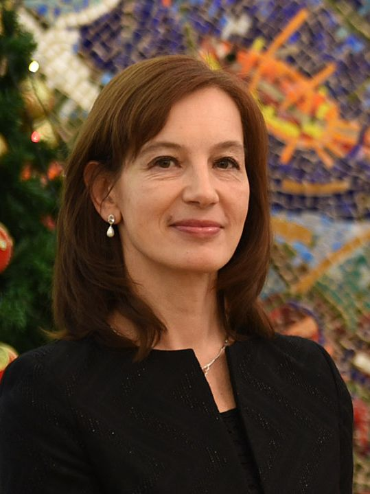 Kristi Karelsohn, Eesti suursaadik Makedoonias